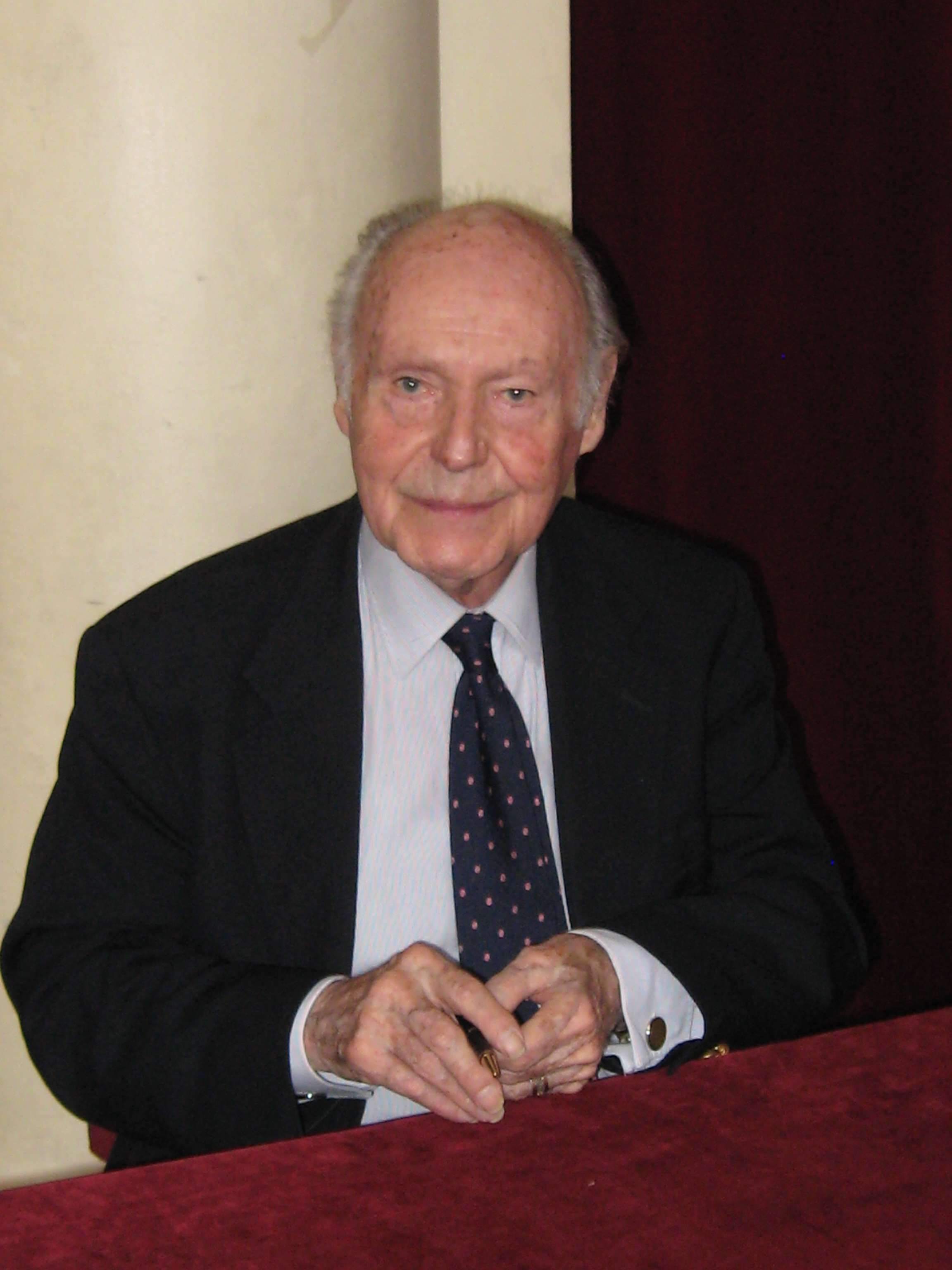 René de Obaldia, poète, romancier, dramaturge français, membre de l'Académie française.